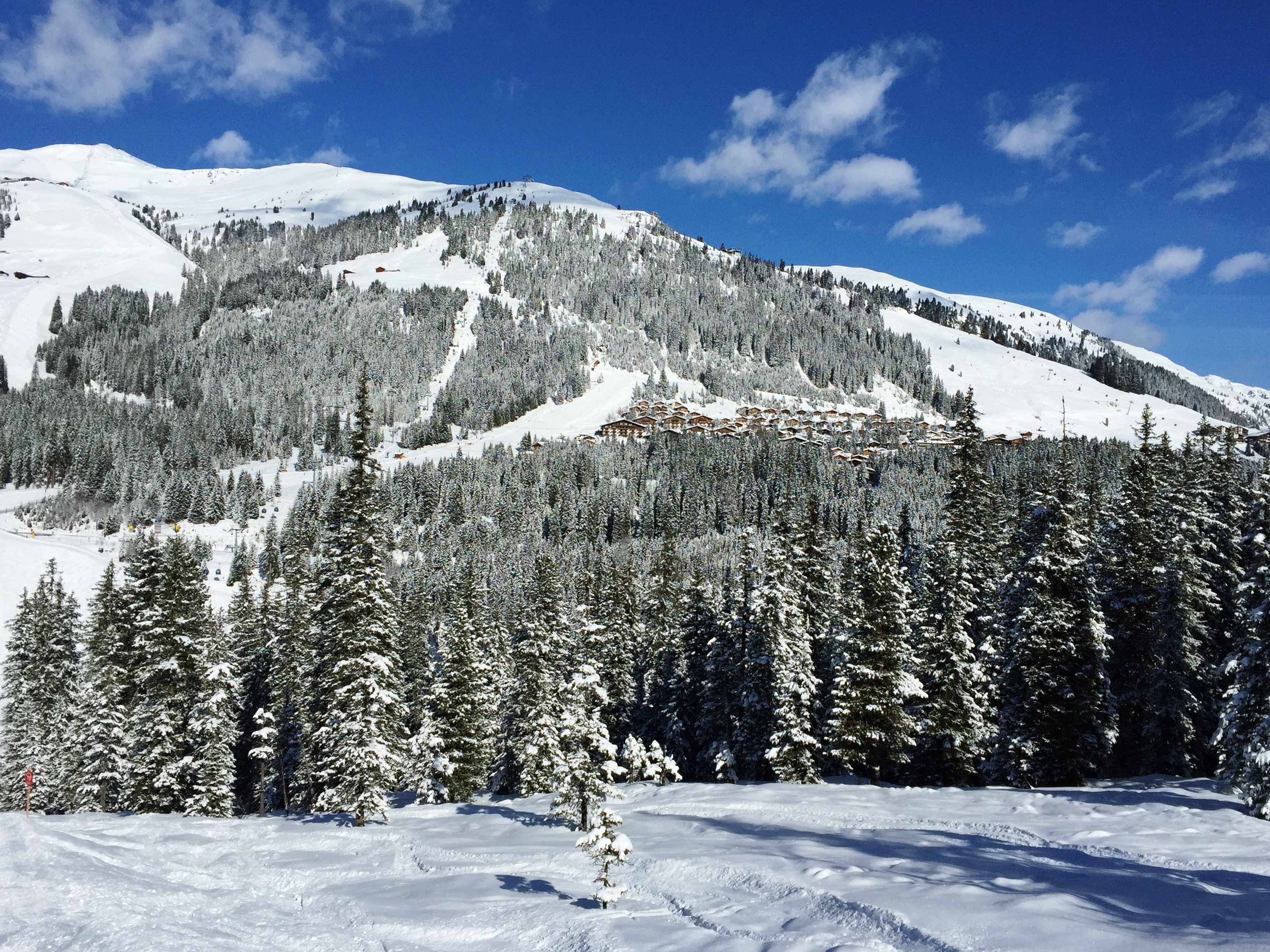 Aussicht vom Plattenkogel auf Königsleiten und die Kitzbüheler Alpen